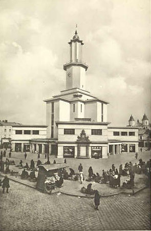 Четверта ратуша у Станиславові. Світлина 1938 року.